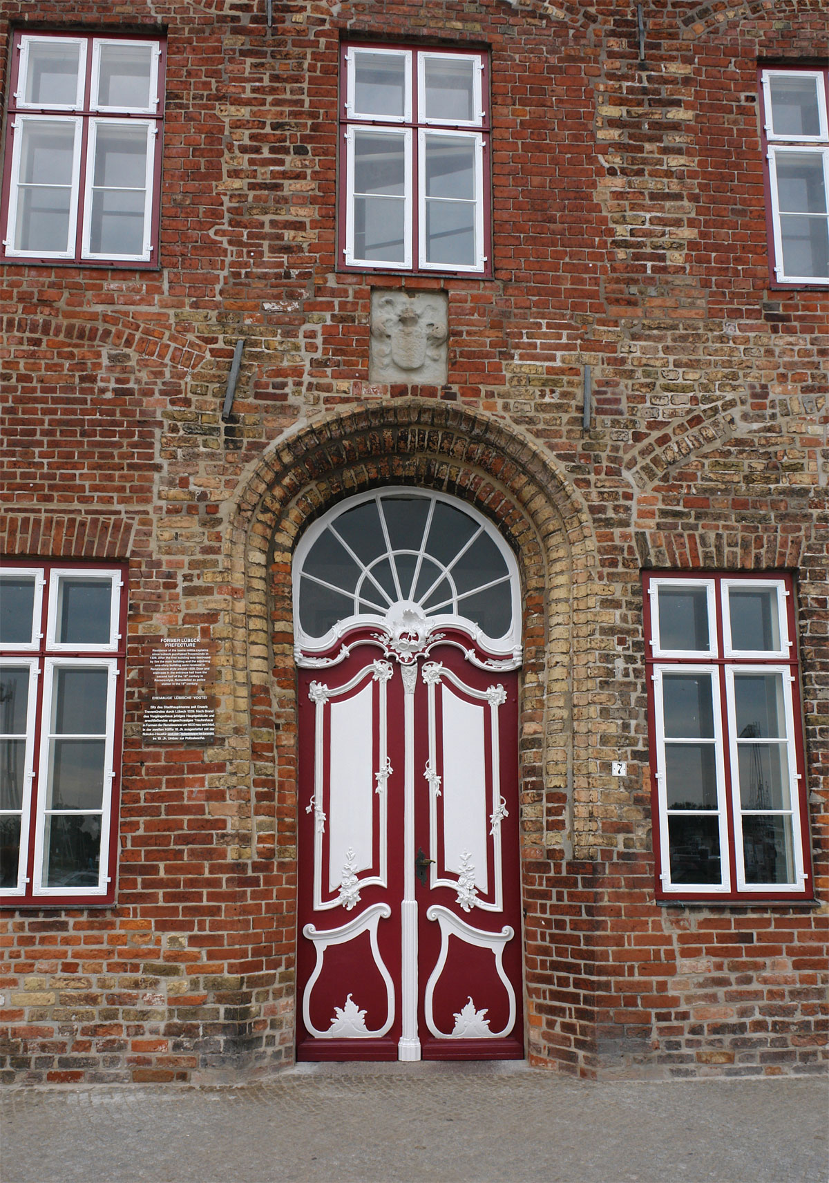 Travemünde: Ehemalige Lübische Vogtei, vermutlich 2.Hälfte 16.Jh. Rokoko-Haustür aus der zweiten Hälfte des 18.Jh.